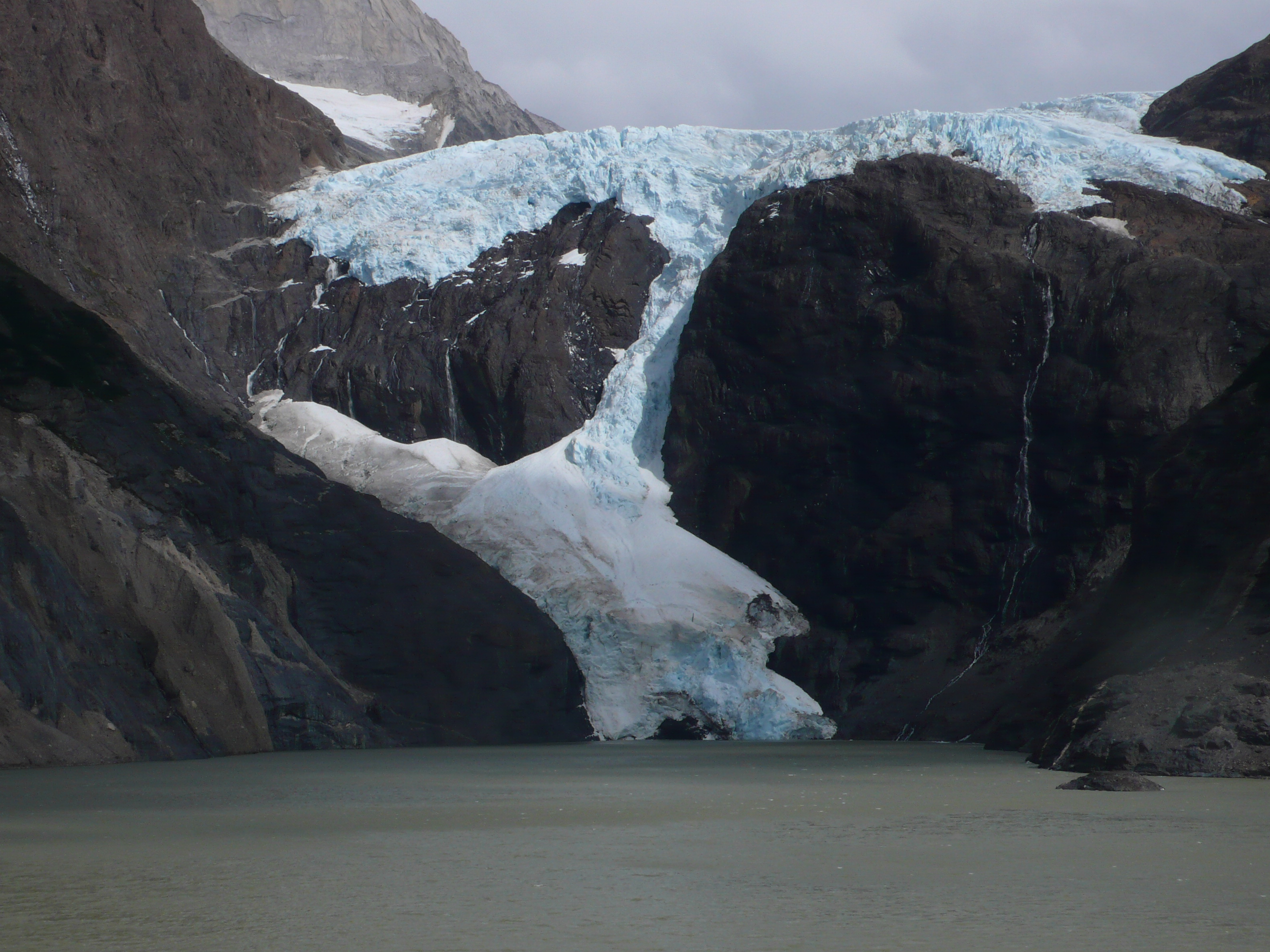 Los Perros Glacier, Torres del Paine National Park, Chile.